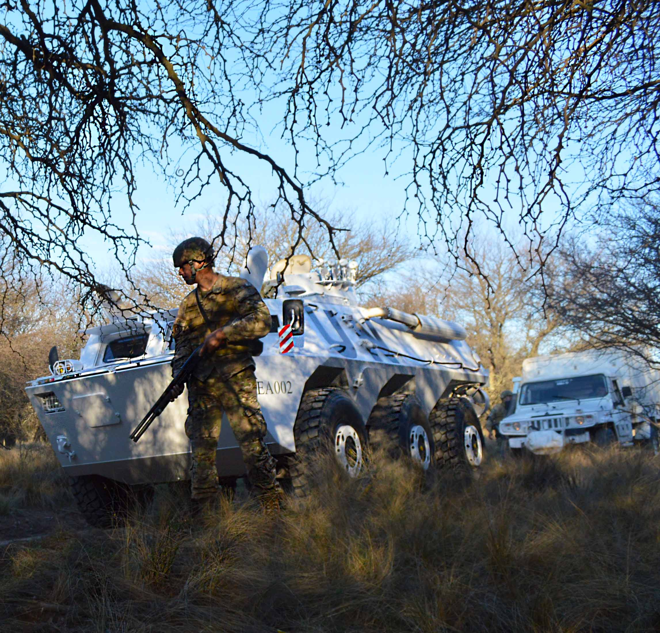 NACIONES UNIDAS